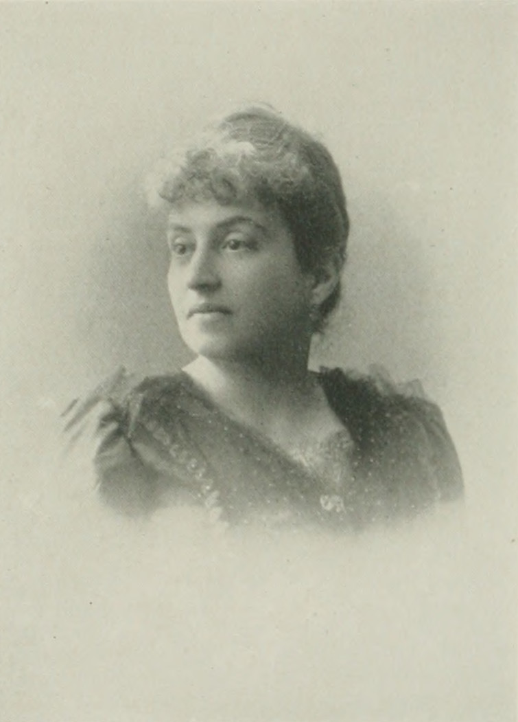 Lee Cohen Harby